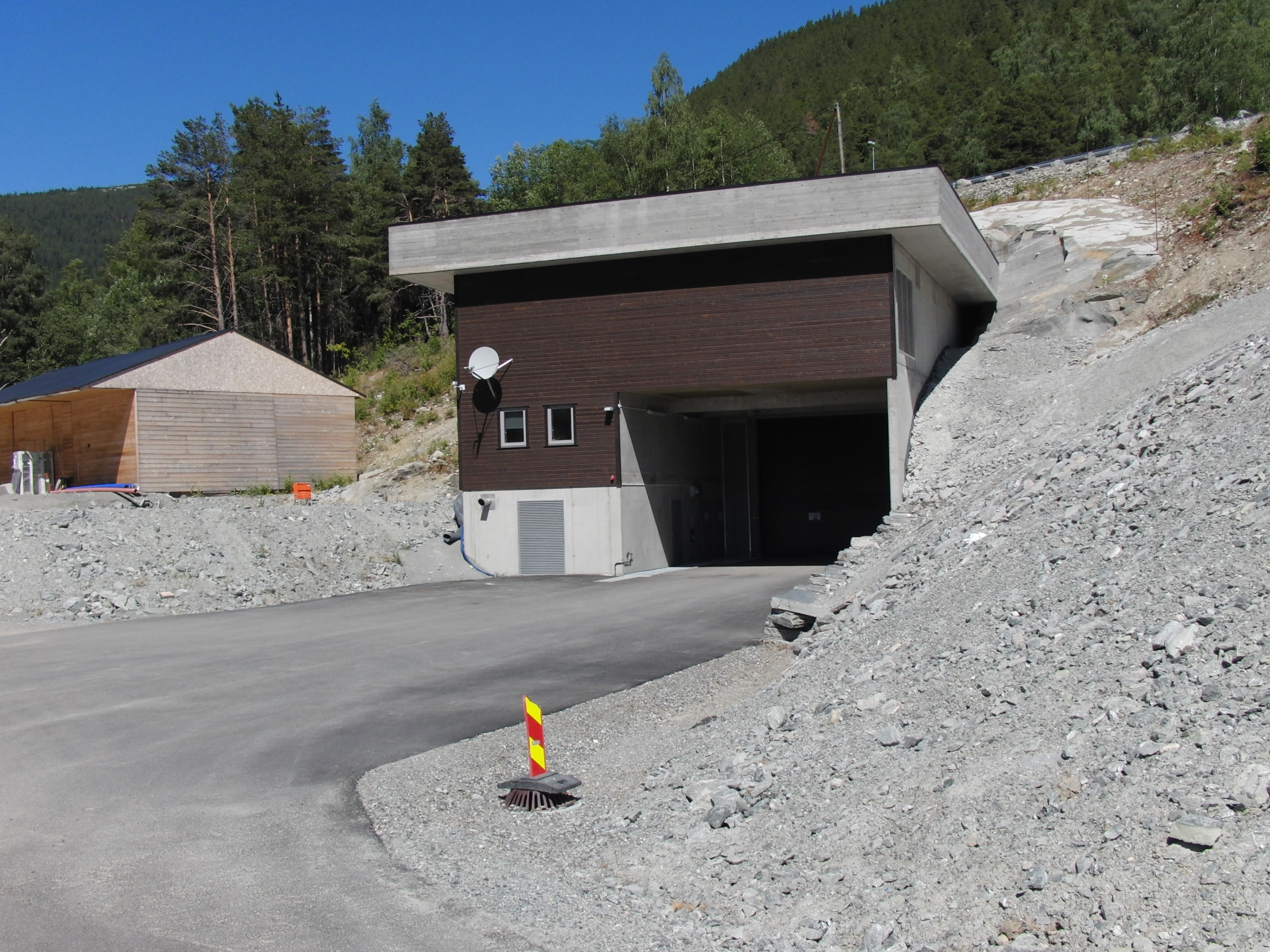 Rosten kraftverk